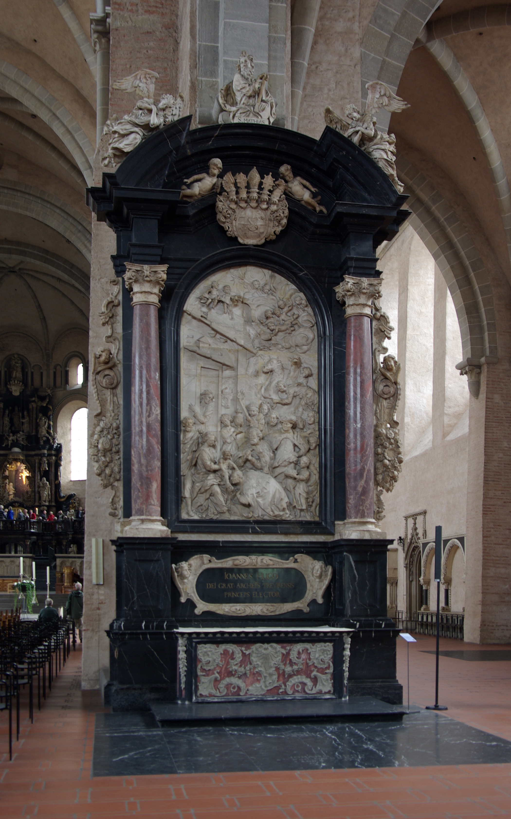 Trierer Dom, Mittelschiff rechte Seite, Dreikönigenaltar, Grabaltar Erzbischof Johann Hugo von Orsbeck